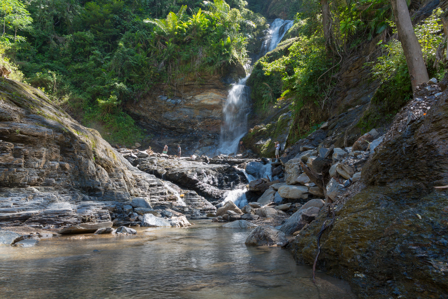 Cascatas de Berloi, Aileu, Timor-Leste